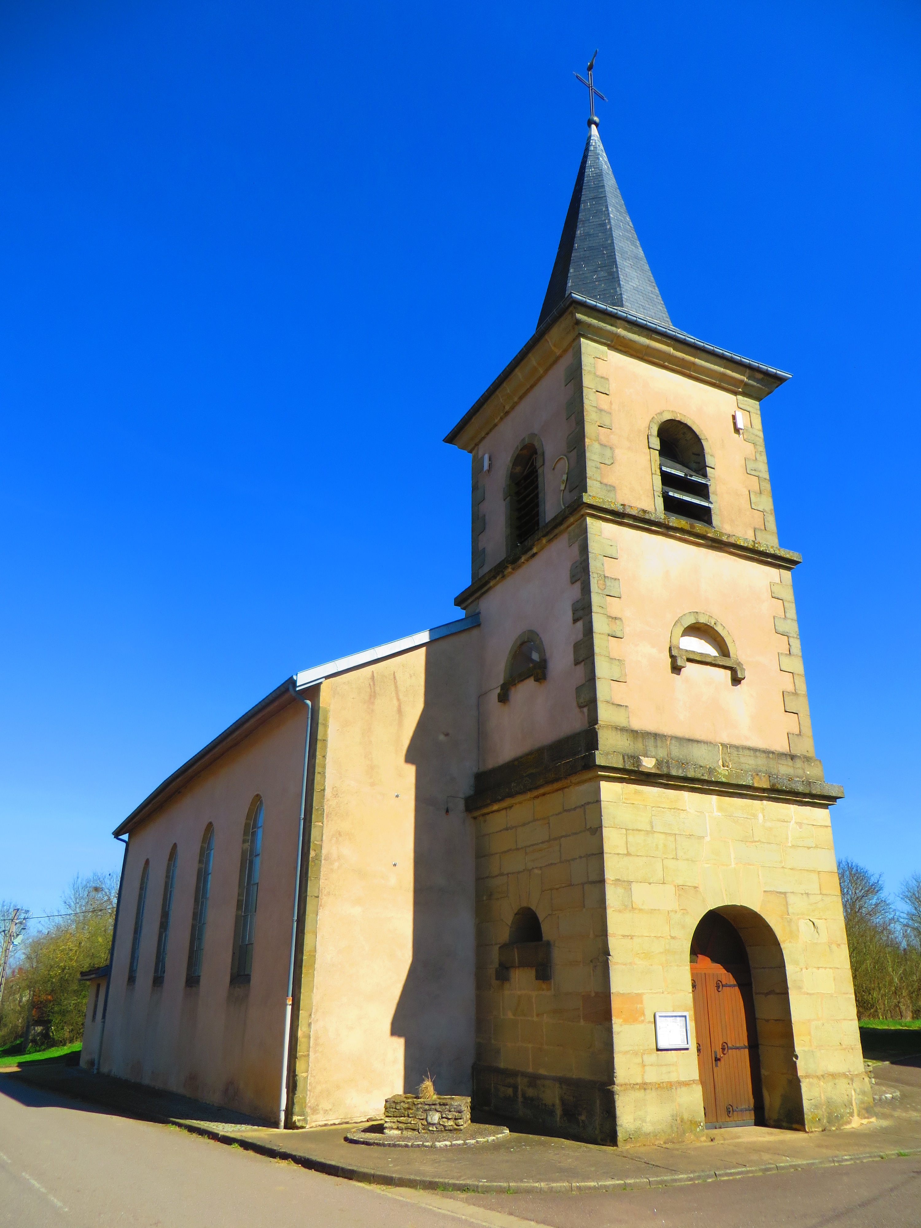 Adelange Église Saint-Roch